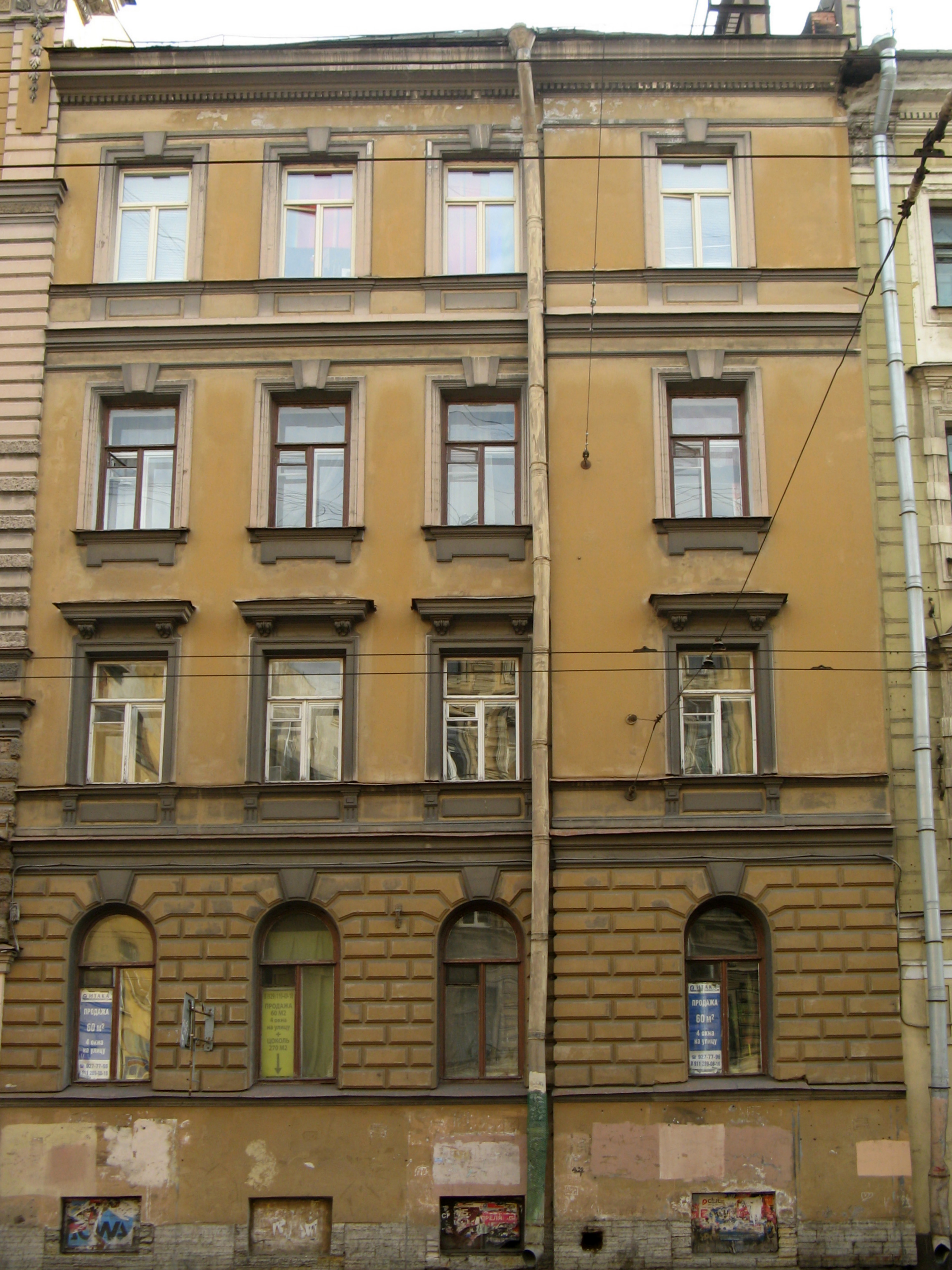 Доходный дом М.А. Лавровой. Дом, где в 1893-1908 гг. жил композитор Н.А. Римский-Корсаков: Загородный проспект, 28, 28Б (дворовый корпус), Центральный район, Санкт-Петербург